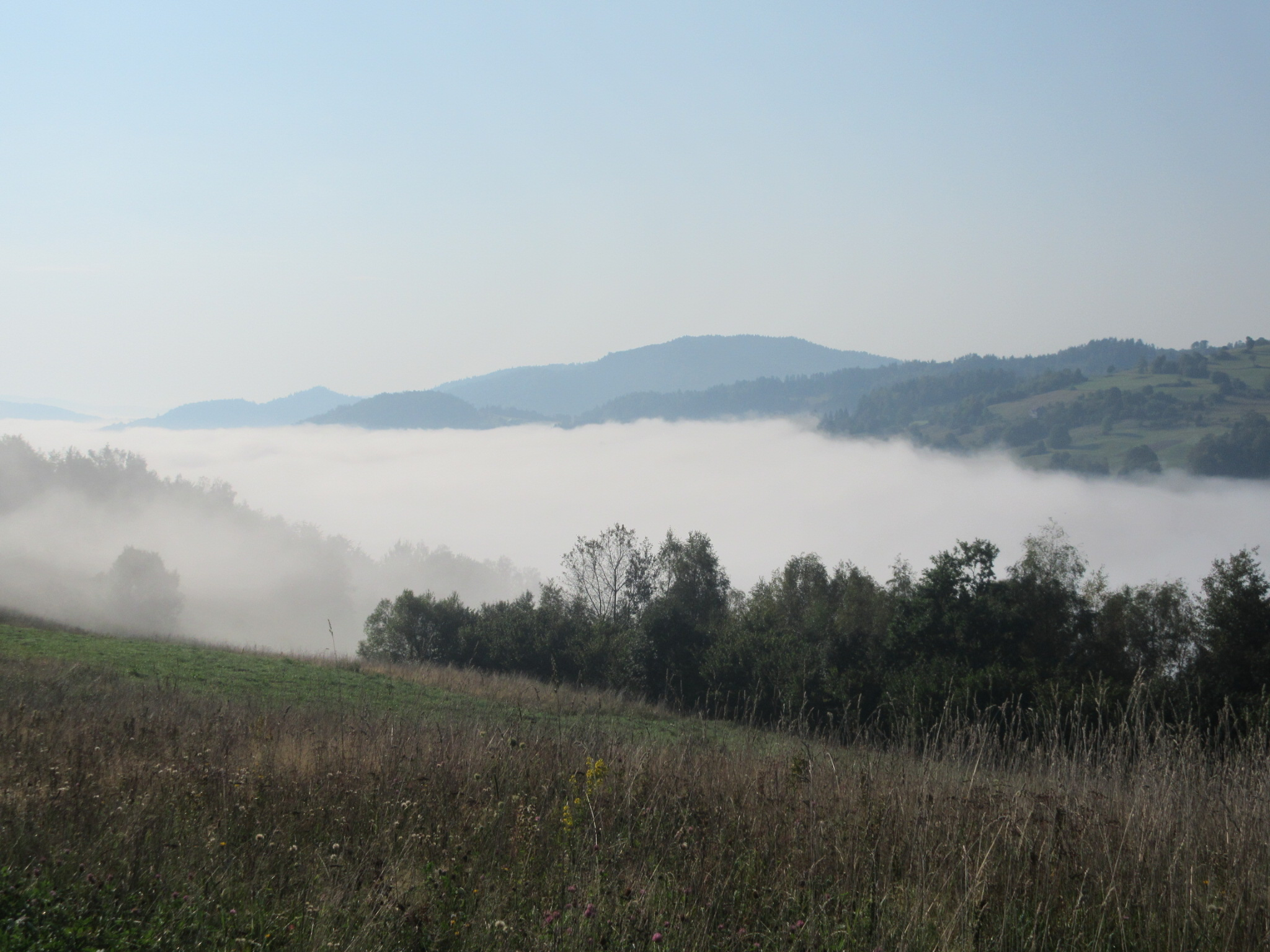 Sea of clouds over Piwniczna-Zdrój in Beskids Morze mgieł nad Piwniczną w Beskidzie Sądeckim